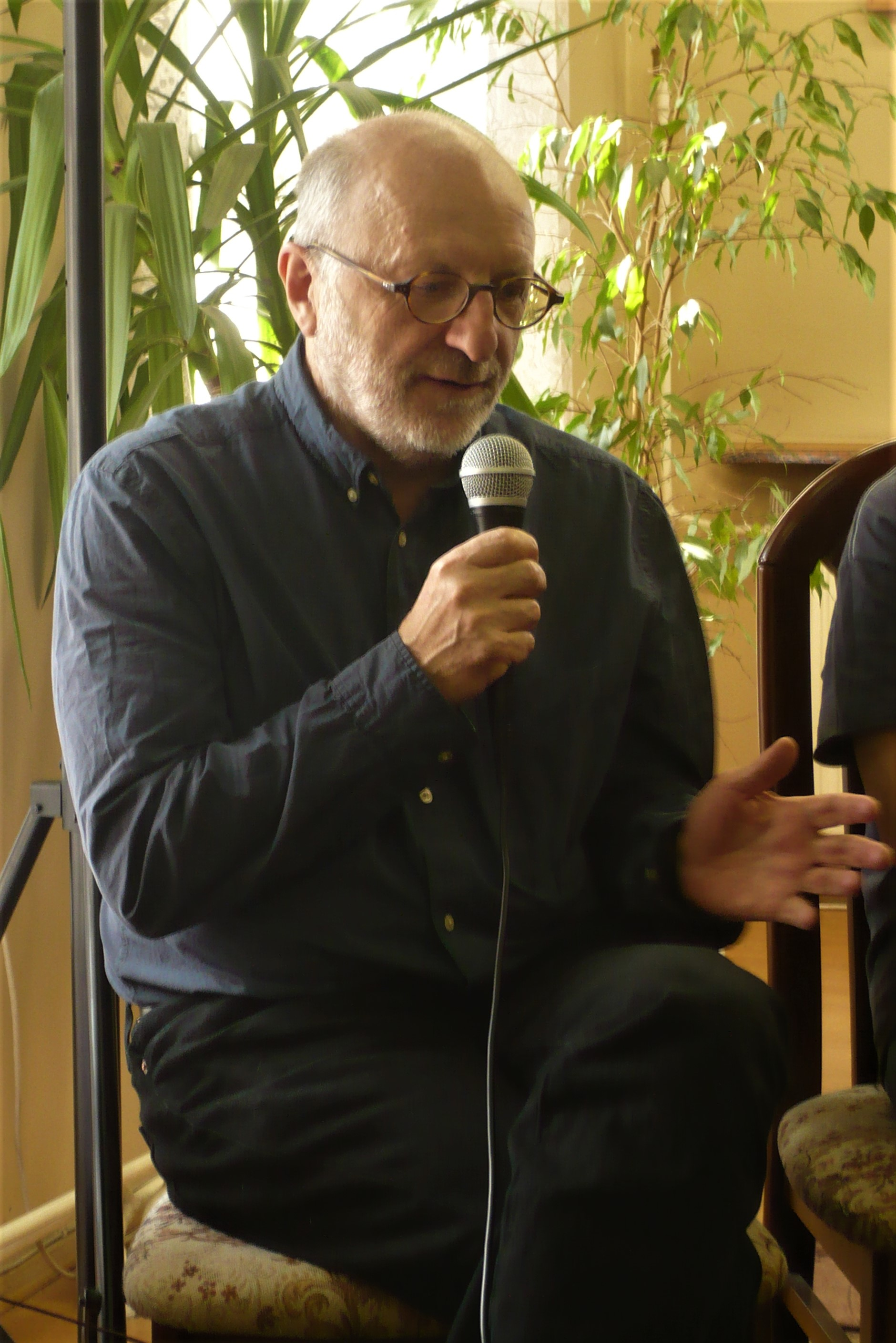 Spotkanie z uczestnikami warsztatów literackich prowadzonych przez O. Tokarczuk, Z. Kruszyńskiego (na fot.) i K. Maliszewskiego, które odbyło się 2.05.18